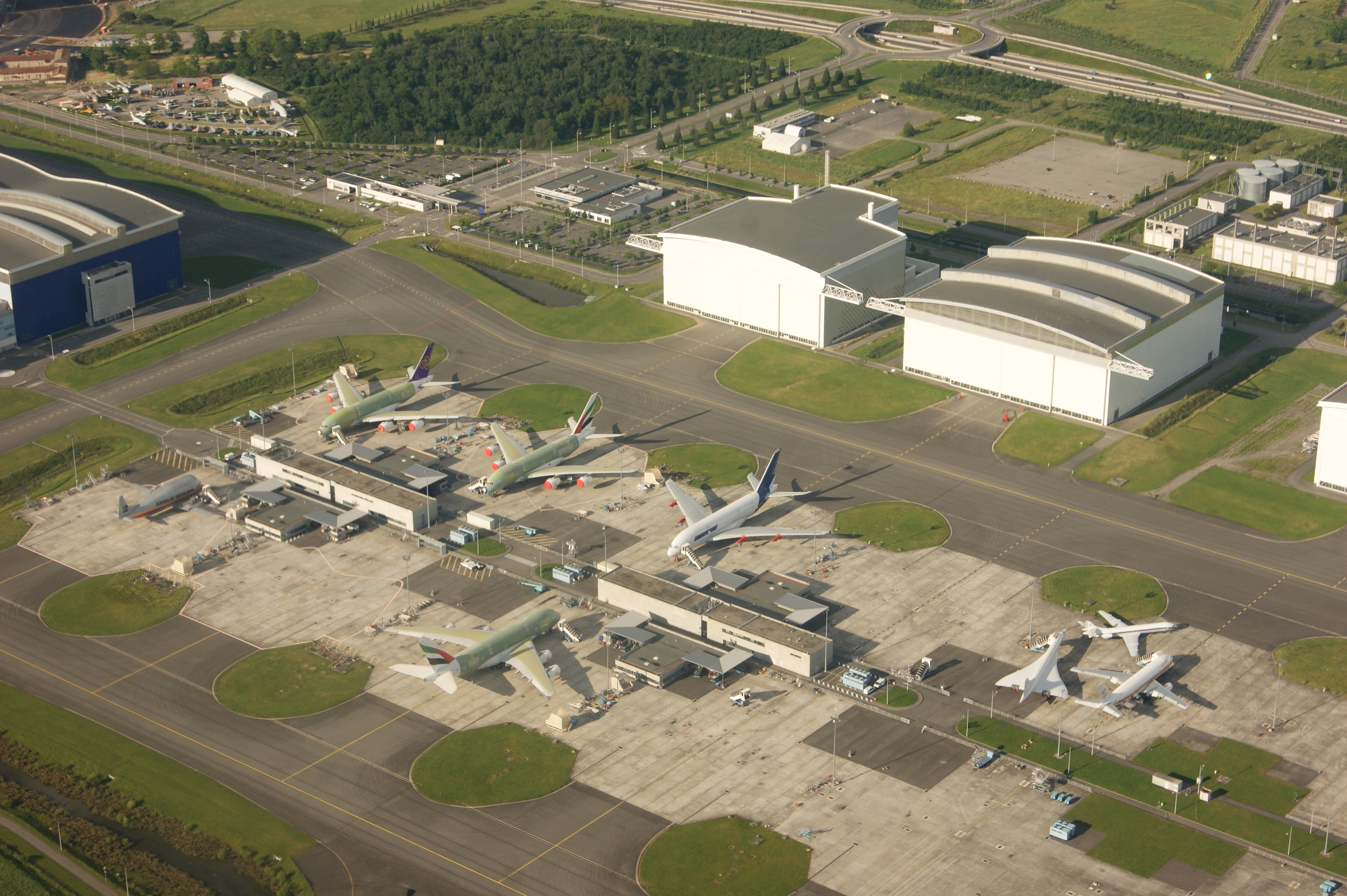 Aéroport Toulouse Blagnac